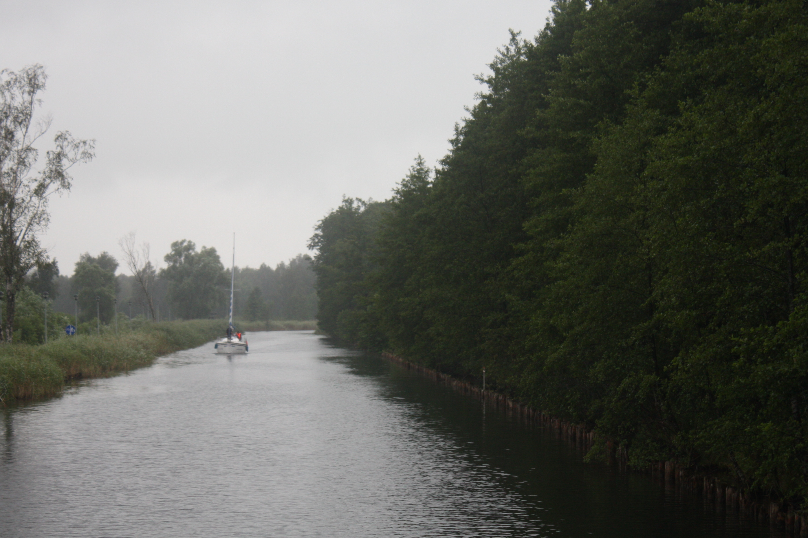 Węgorapa w Węgorzewie This photo of Warmian-Masurian Voivodeship was taken during Wikiexpedition 2012 set up by Wikimedia Polska Association. You can see all photographs in category Wikiekspedycja 2012. The making of this document was supported by Wikimedia Polska.